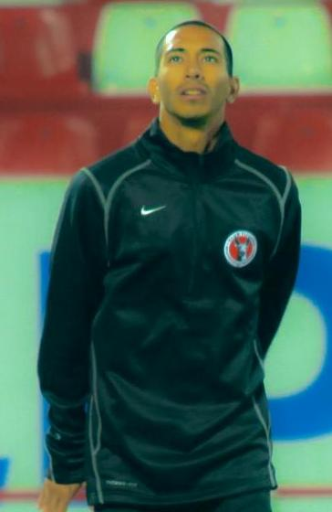 partido amistoso celebrado en el estadio caliente de tijuana previo al clausura 2012